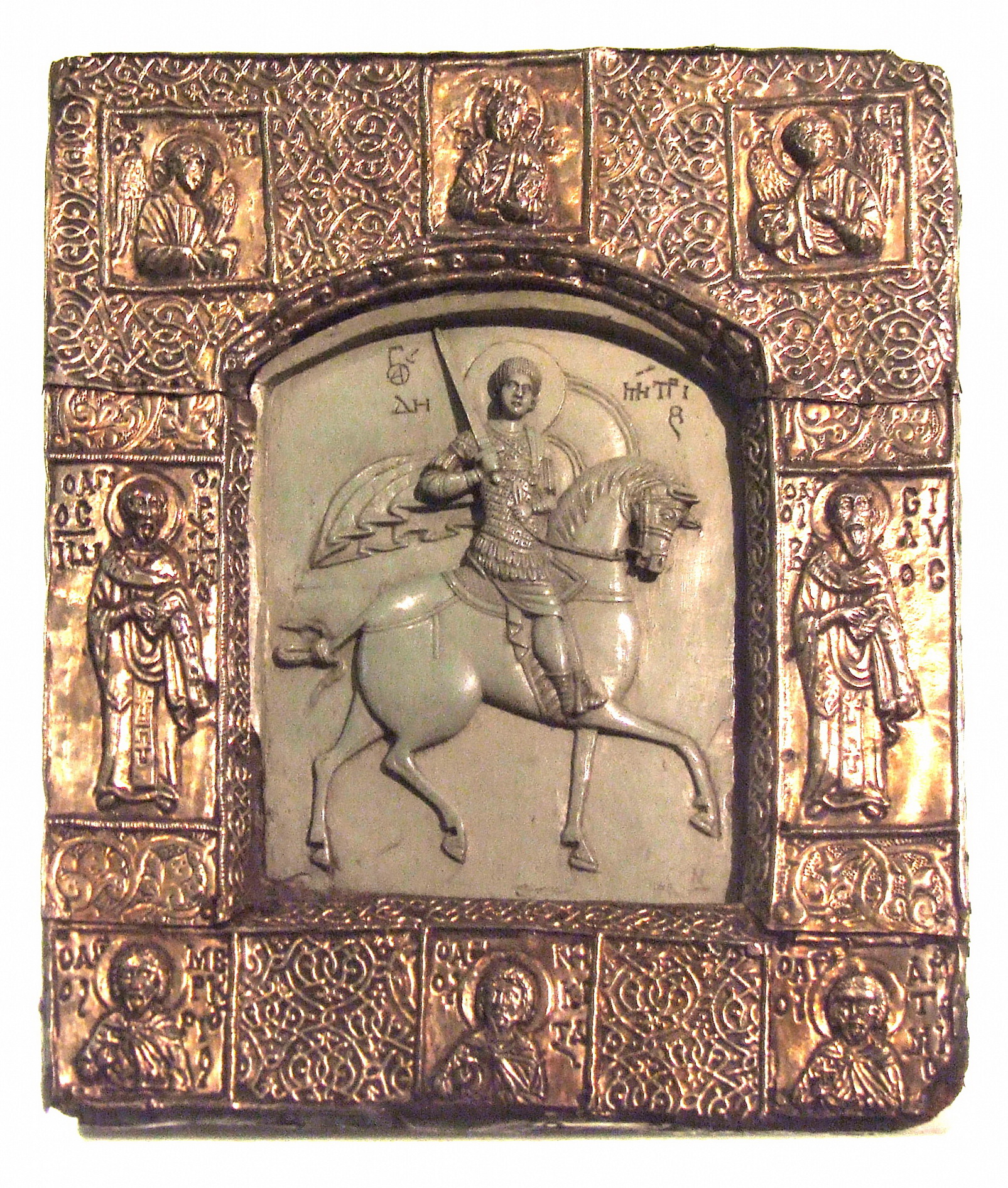 Вмч. Димитрий Солунский. Икона. Рубеж XIII и XIV вв. Государственный Музей Московского Кремля (ГММК). Стеатитовая икона XIV века с, часто встречающимся в византийской мелкой пластике, изображением святого воина Дмитрия Солунского - памятник русско-византийских политических отношений. По преданию, эту икону, прислал московскому князю Дмитрию Донскому византийский император, в честь победы на Куликовом поле 8 сентября 1380 года.